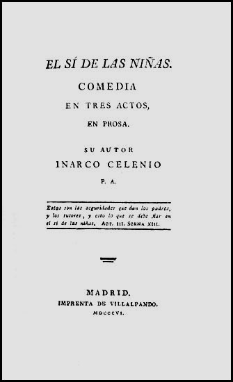 Portada de la edición princeps de El sí de las niñas, de Leandro Fernández de Moratín